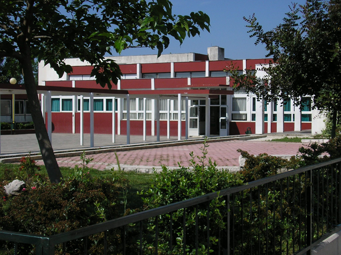 osnovna ?kola "Prof. Filip Lukas"